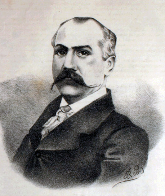 Benjamín Vicuña Mackenna (* Santiago, 25 de agosto de 1831 - † Santa Rosa de Colmo, 25 de enero de 1886) fue un destacado político e historiador chileno. Fue hijo de Pedro Félix Vicuña y de Carmen Mackenna (hija de Juan Mackenna), realizó sus estudios en el Instituto Nacional y la Universidad de Chile, graduándose de abogado en 1857.